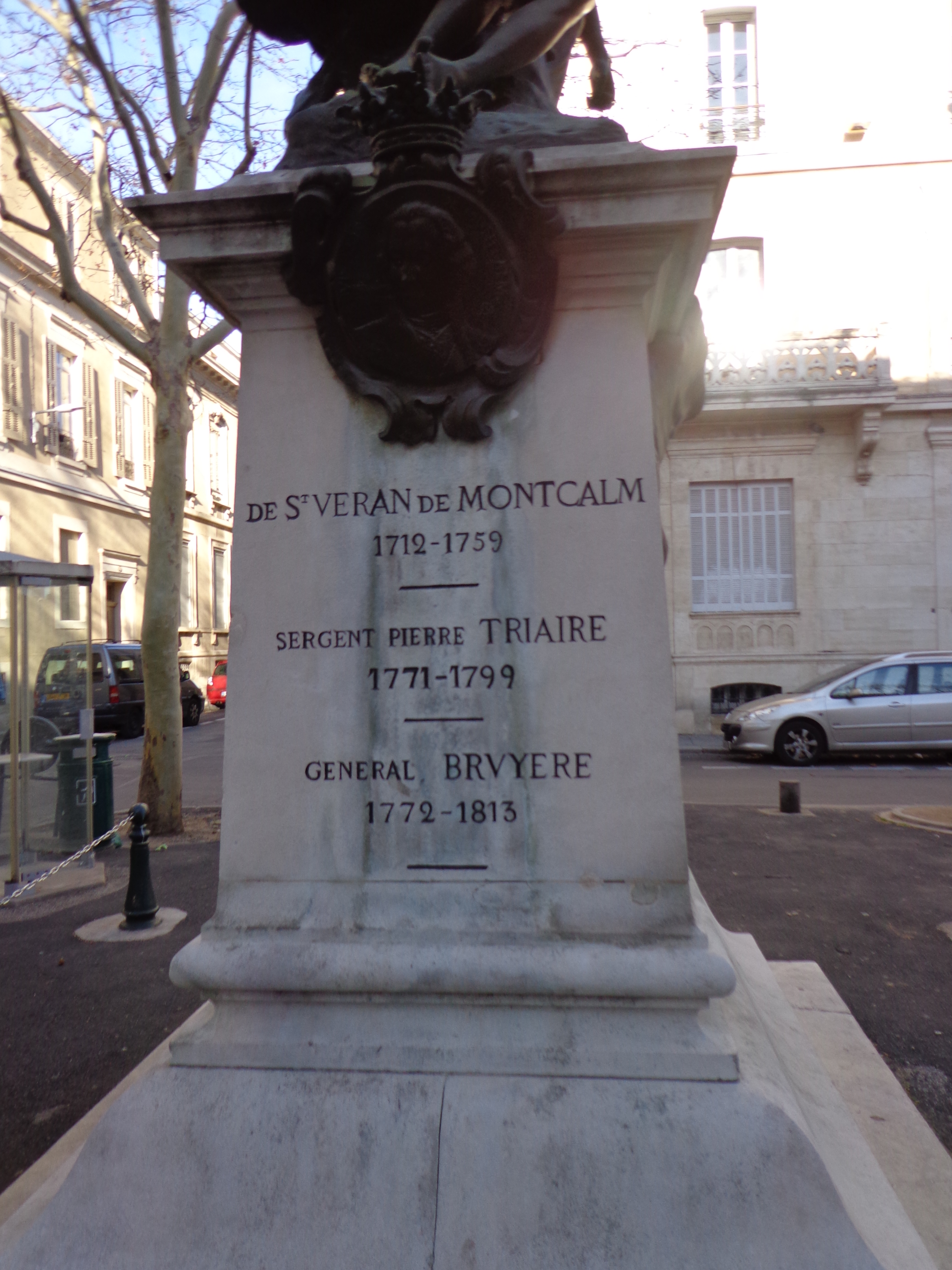 Nîmes - (Gard) - mémorial «aux enfants du Gard, morts pour la patrie» : de Saint Veran de Montcalm (1712-1759), sergent Pierre Triaire (1771-1799), général Bruyère (1772-1813)